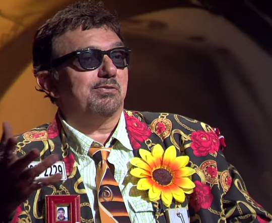 Marcondes Falcão Maia (Pereiro, 16 de setembro de 1957), mais conhecido pelo seu nome artístico Falcão, é um cantor, apresentador e compositor brega notado pelo estilo irreverente e cômico